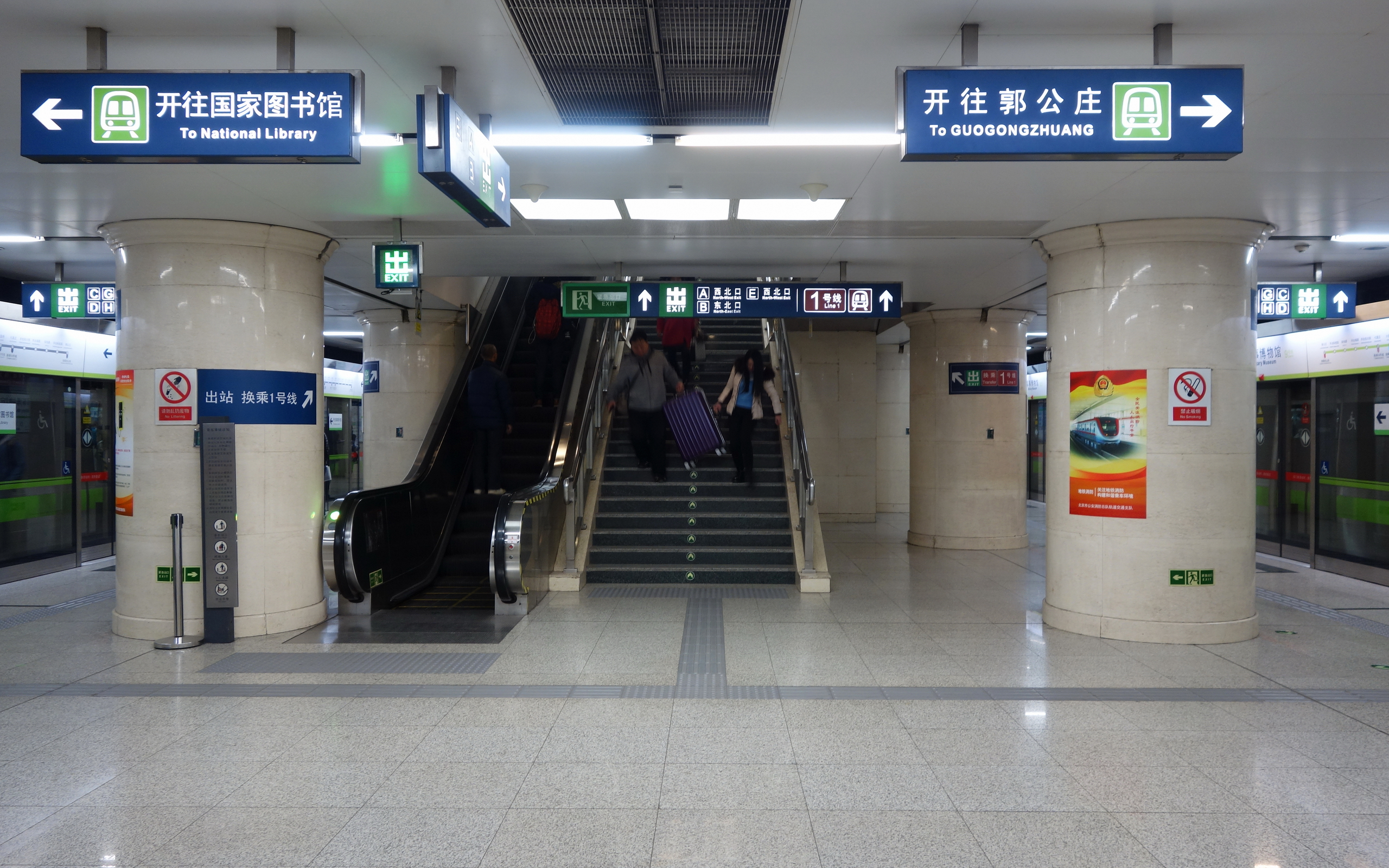 北京地铁9号线军事博物馆站岛式站台